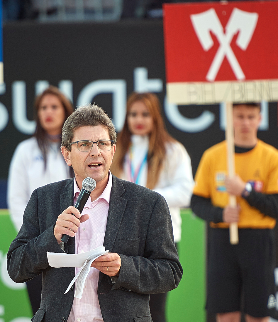 Eröffnung Beach Euro 2016